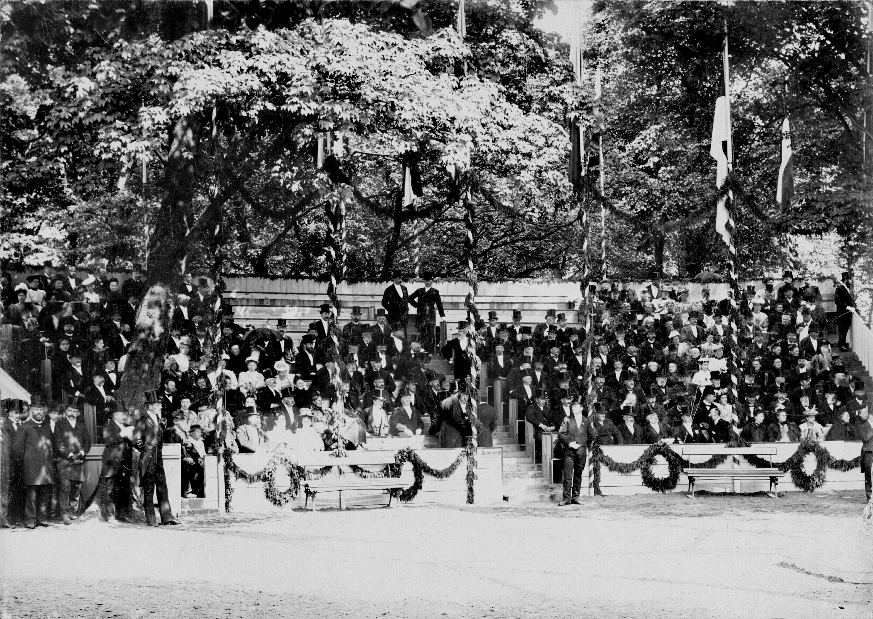 Bildet er hentet fra Nasjonalbibliotekets bildesamling Lübeck, Schleswig-Holstein